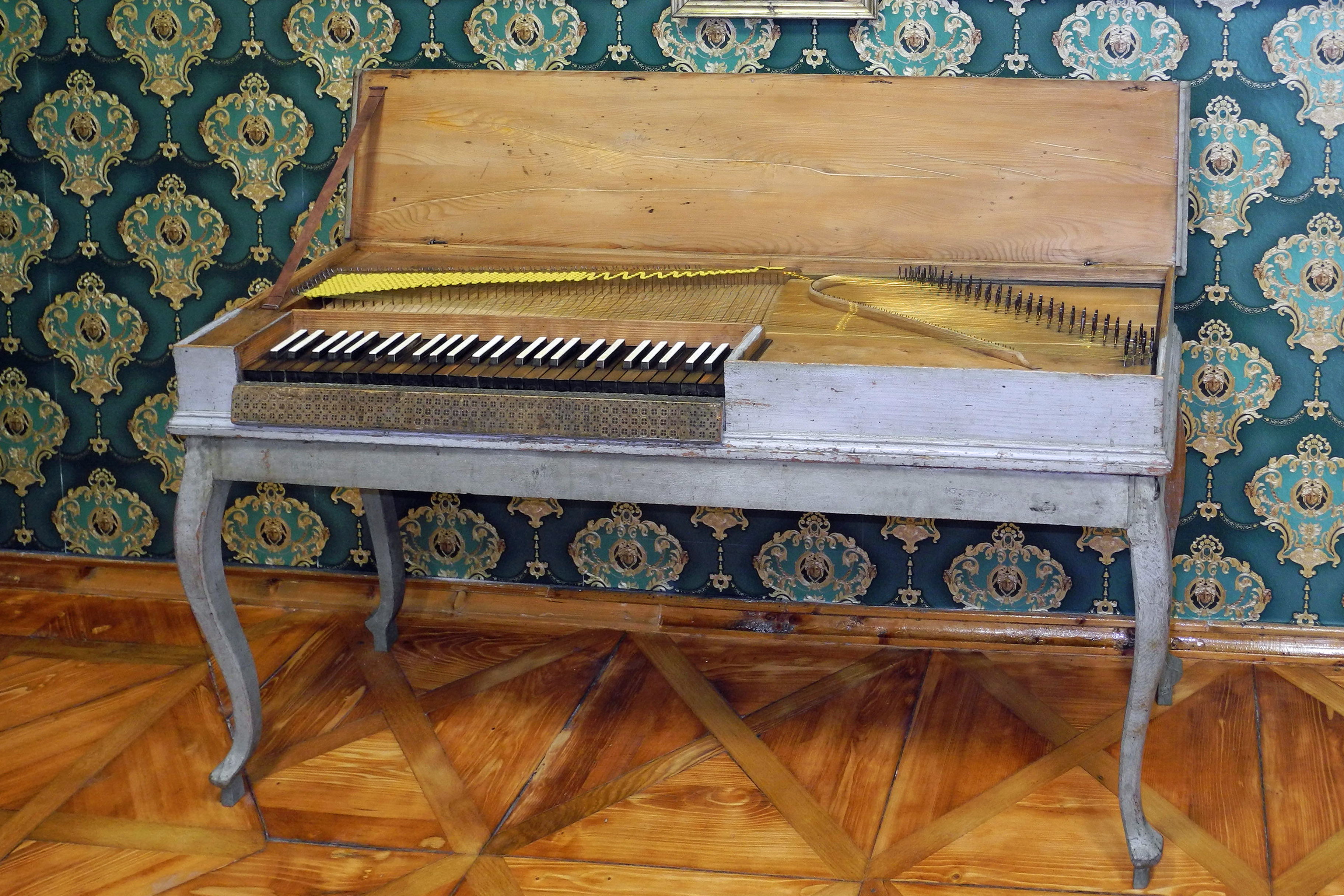 Restauriertes Clavichord aus dem Nachlass von August Stradal (1860–1930) im Stadtmuseum Rumburk